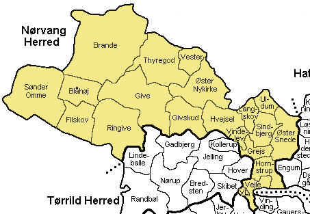 Nørvang Herred, Vejle Amt, Denmark Map by Svend-Erik Christiansen , edited by Nico-dk.